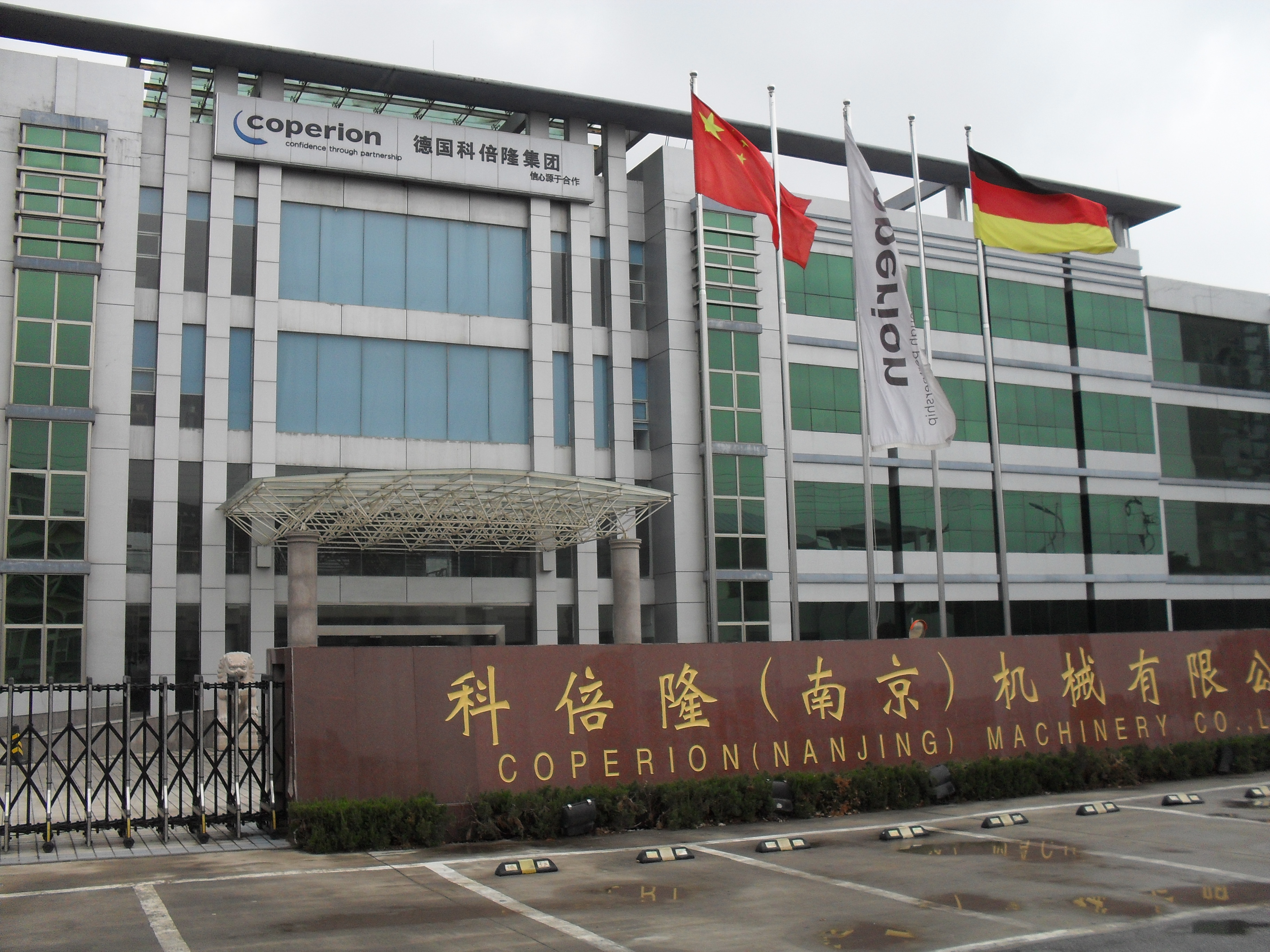 南京天元西路